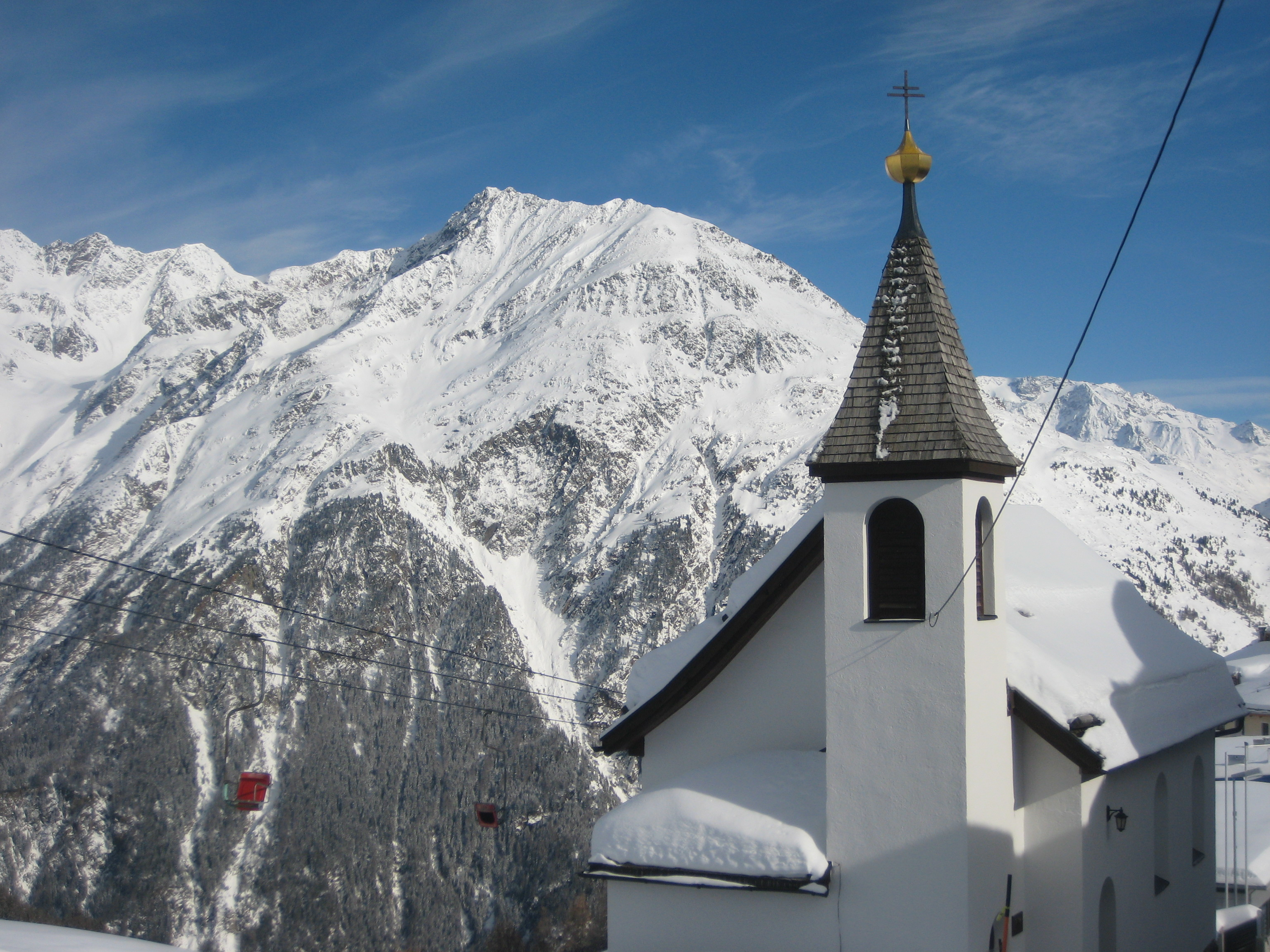 Kapelle in Hochsölden This media shows the remarkable cultural object in the Austrian state of Tyrol listed by the Tyrolean Art Cadastre with the ID 21767. (More images on Commons)